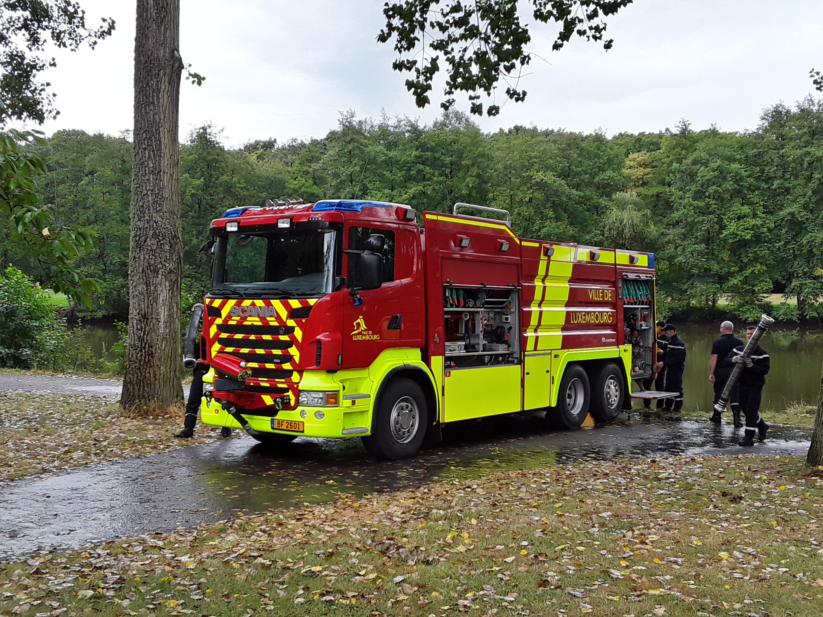 Camion vun de Beruffspompjeeën aus der Stad Lëtzebuerg.